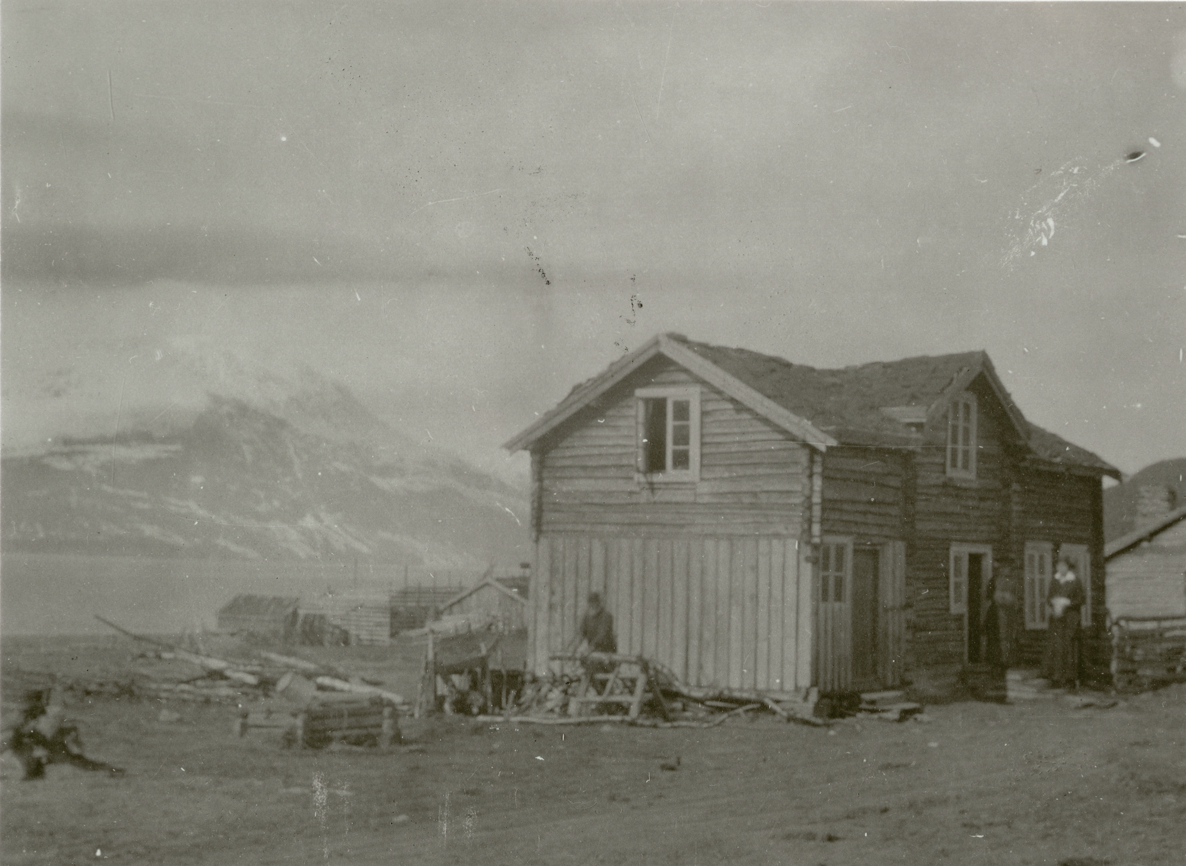 Storfjord, Skibotn i Storfjord, Troms Gave fra Evi og Gunnar Fleischer 1982 This image on crowdsourcing geotagging platform Fotodugnad